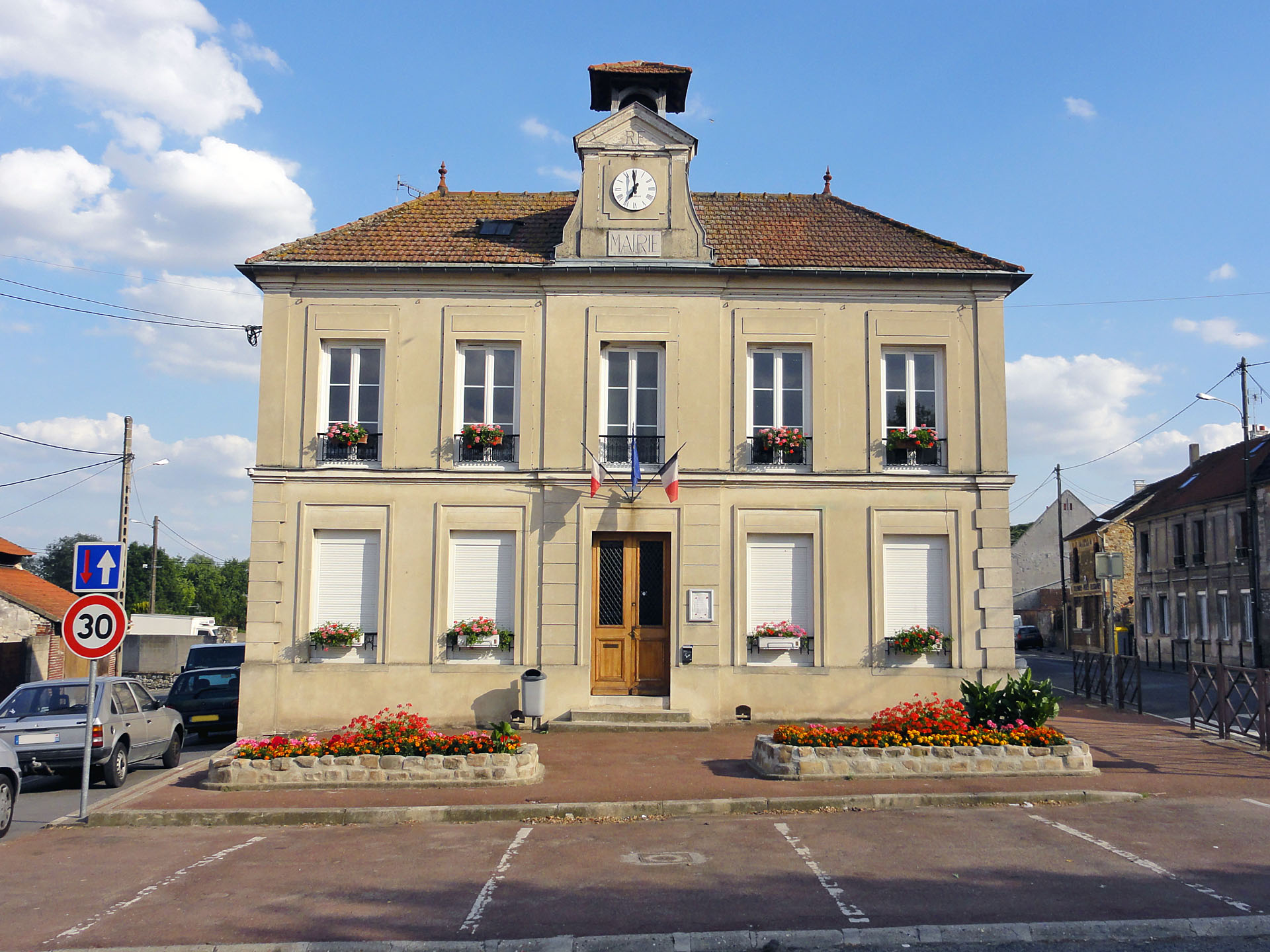 La mairie du Mesnil-Aubry, Val-d'Oise, France.